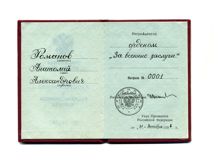 Удостоверение награжденного орденом «За военные заслуги» генерал-полковника Анатолия Александровича Ельцина от 31 декабря 1994 года за подписью президента России Бориса Ельцина.